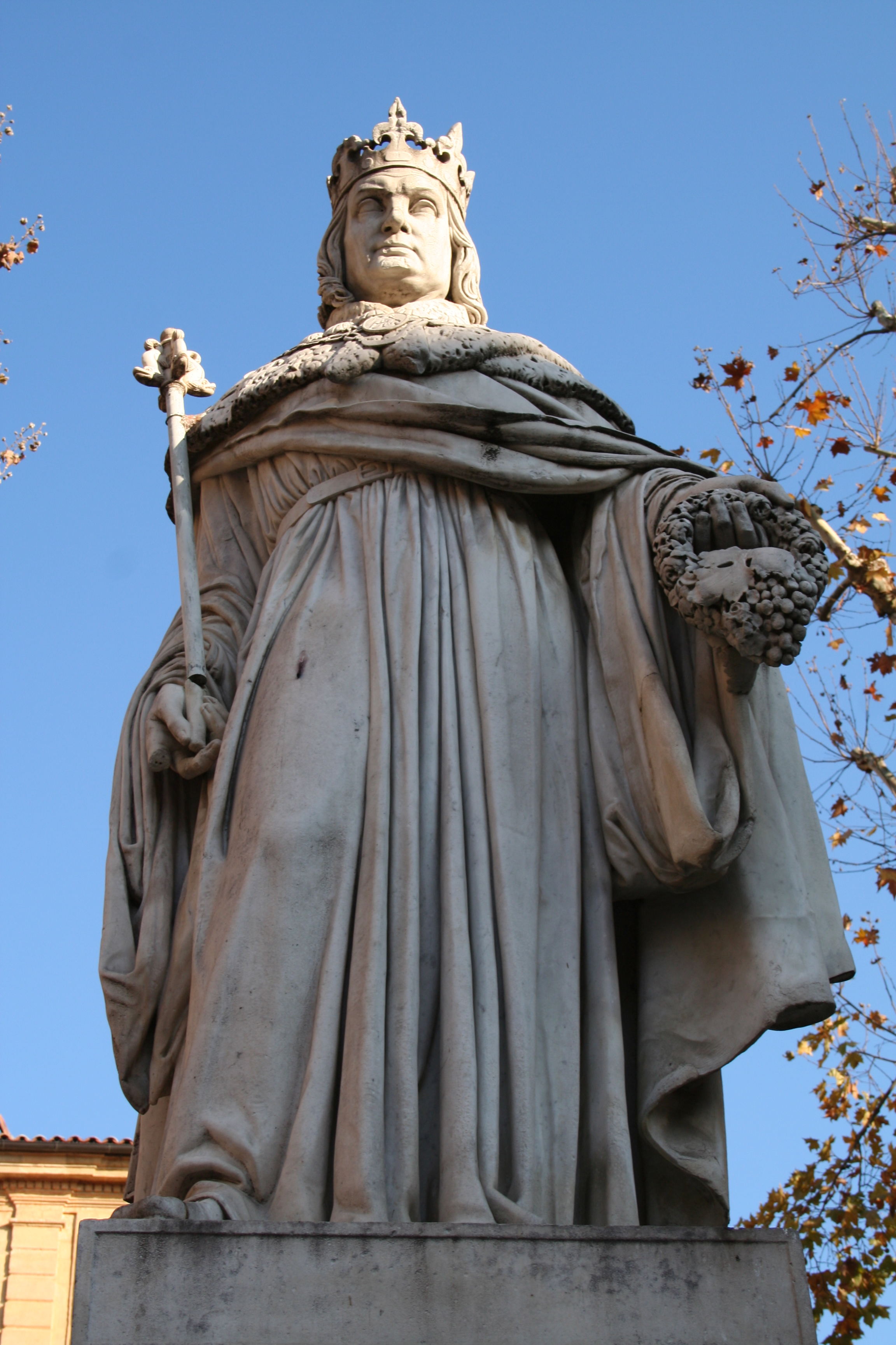 René Ier de Naples, Aix-en-Provence (France).